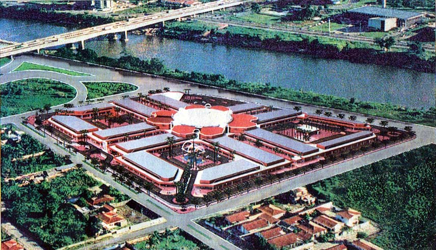 Margem direita do Rio Poty, em Teresina, vendo-se a ponte JK, O Palácio Petrônio Portela e a plana alta gráfica do Riverside Shopping.